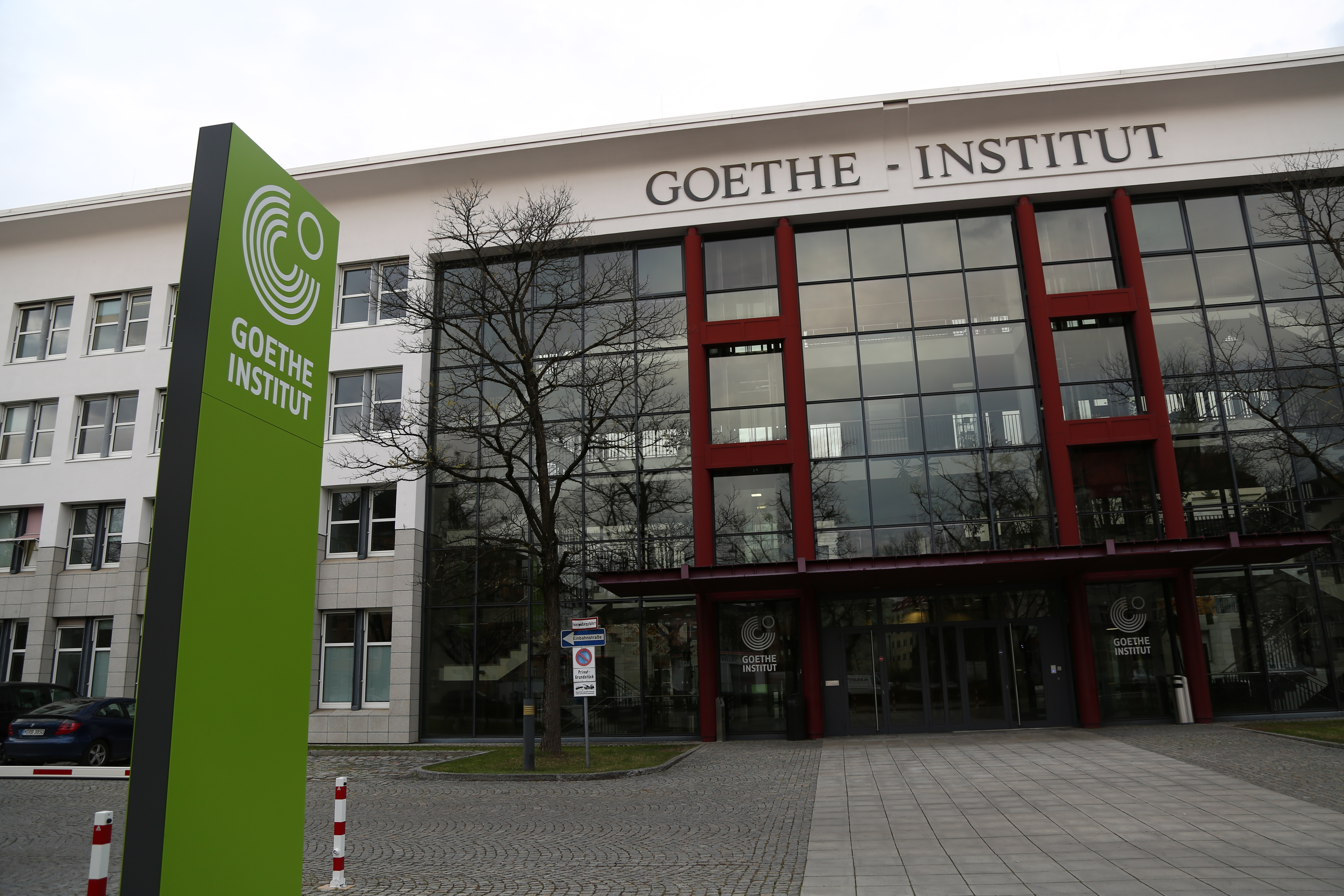 Zentrale des Goethe-Instituts in München